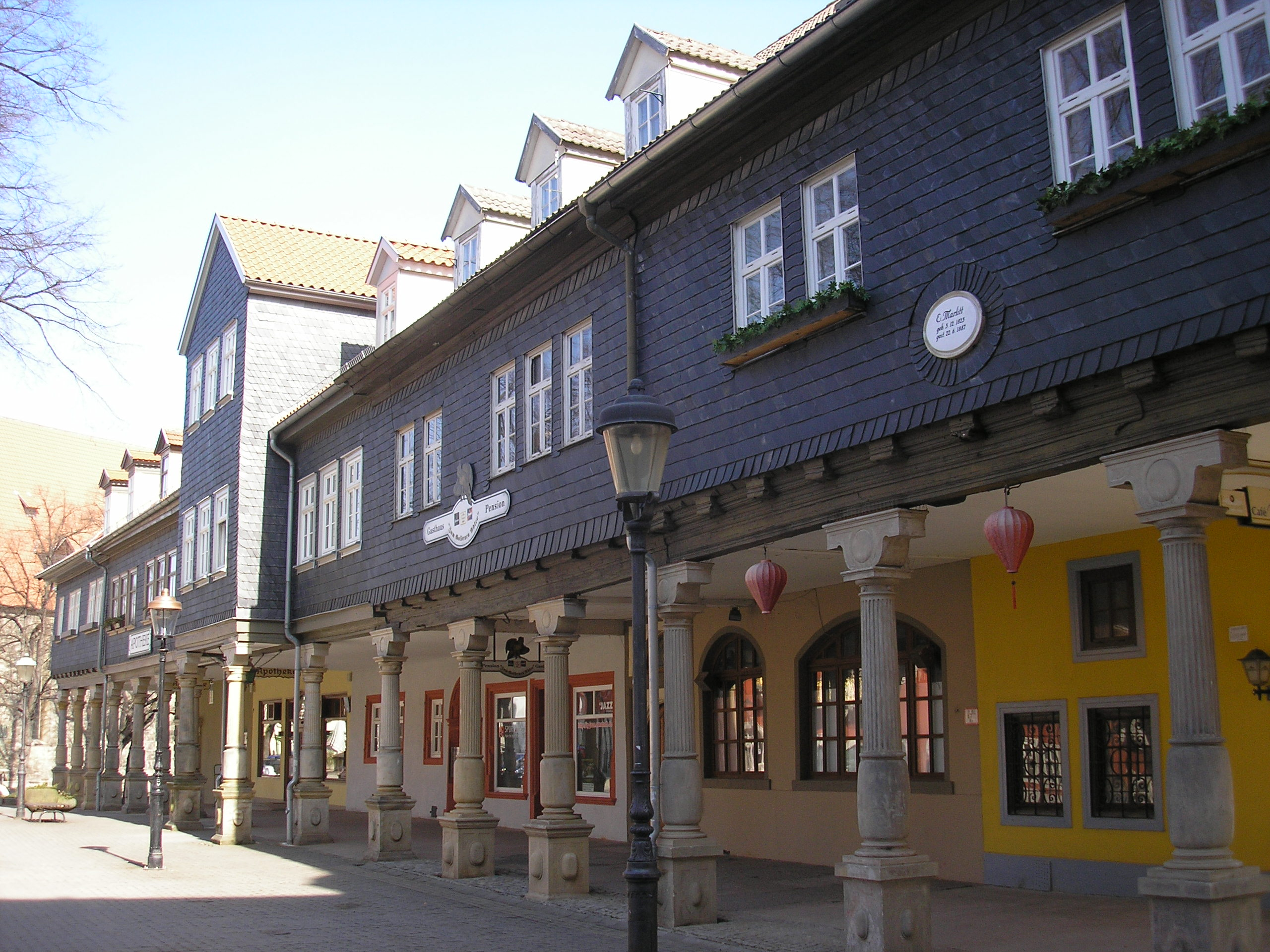 Die Arkaden an der Ostseite des Markts in Arnstadt (Thüringen).